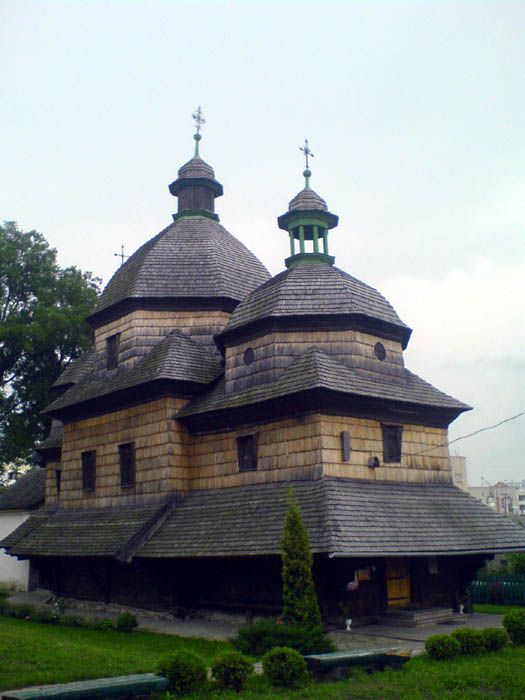 Церква Різдва Богородиці: м. Жовква